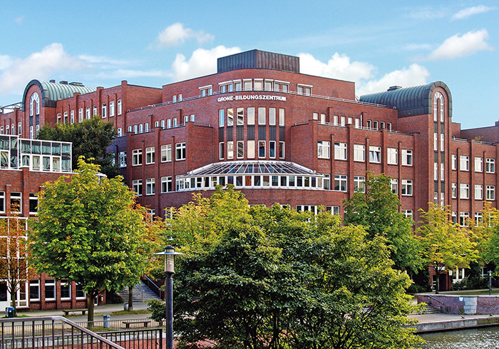 Hauptgebäude der Stiftung Grone-Schule (Schulbetrieb) in Hamburg Hammerbrook